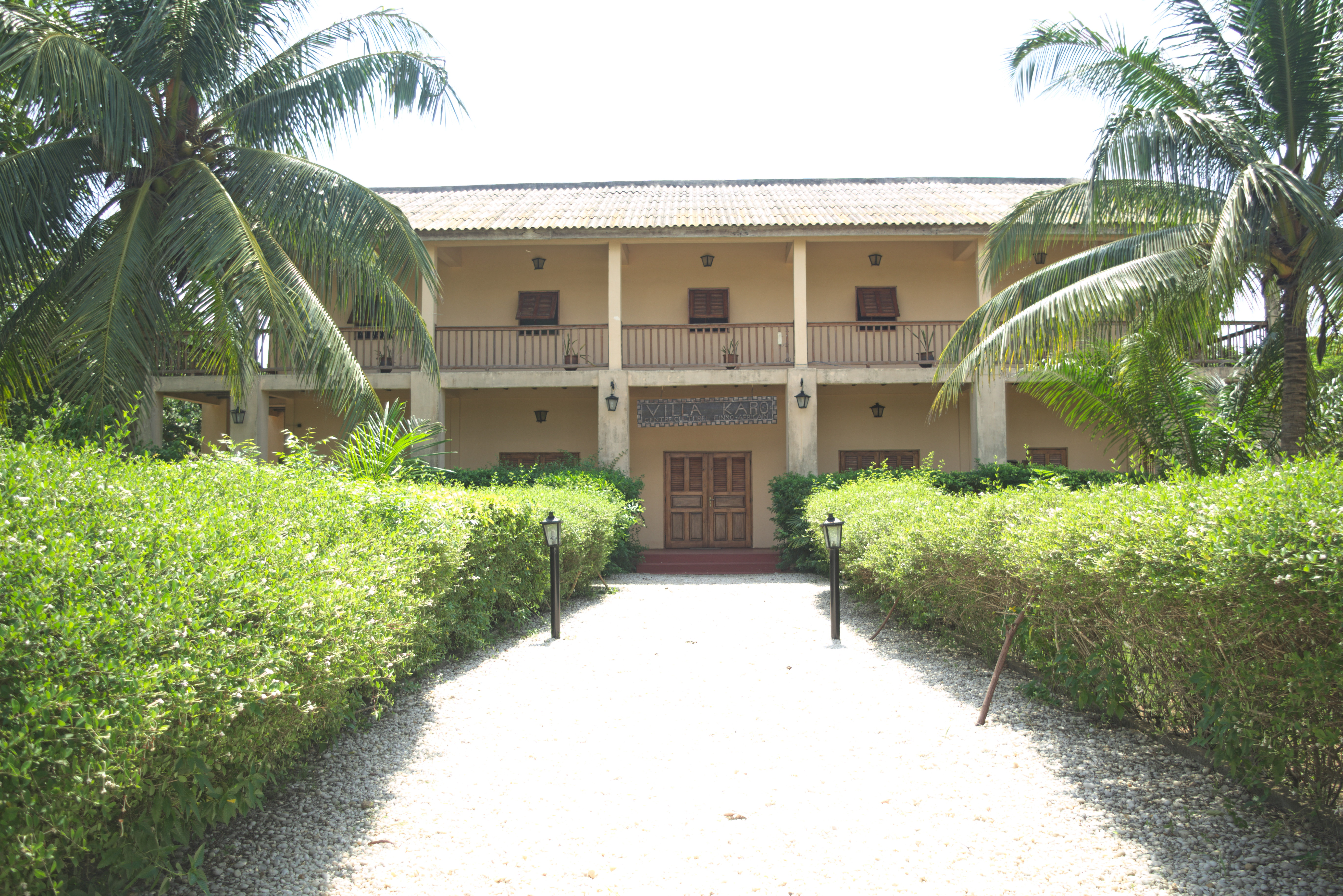 Bâtiment de la Villa Karo abritant la bibliothèque et la résidence.